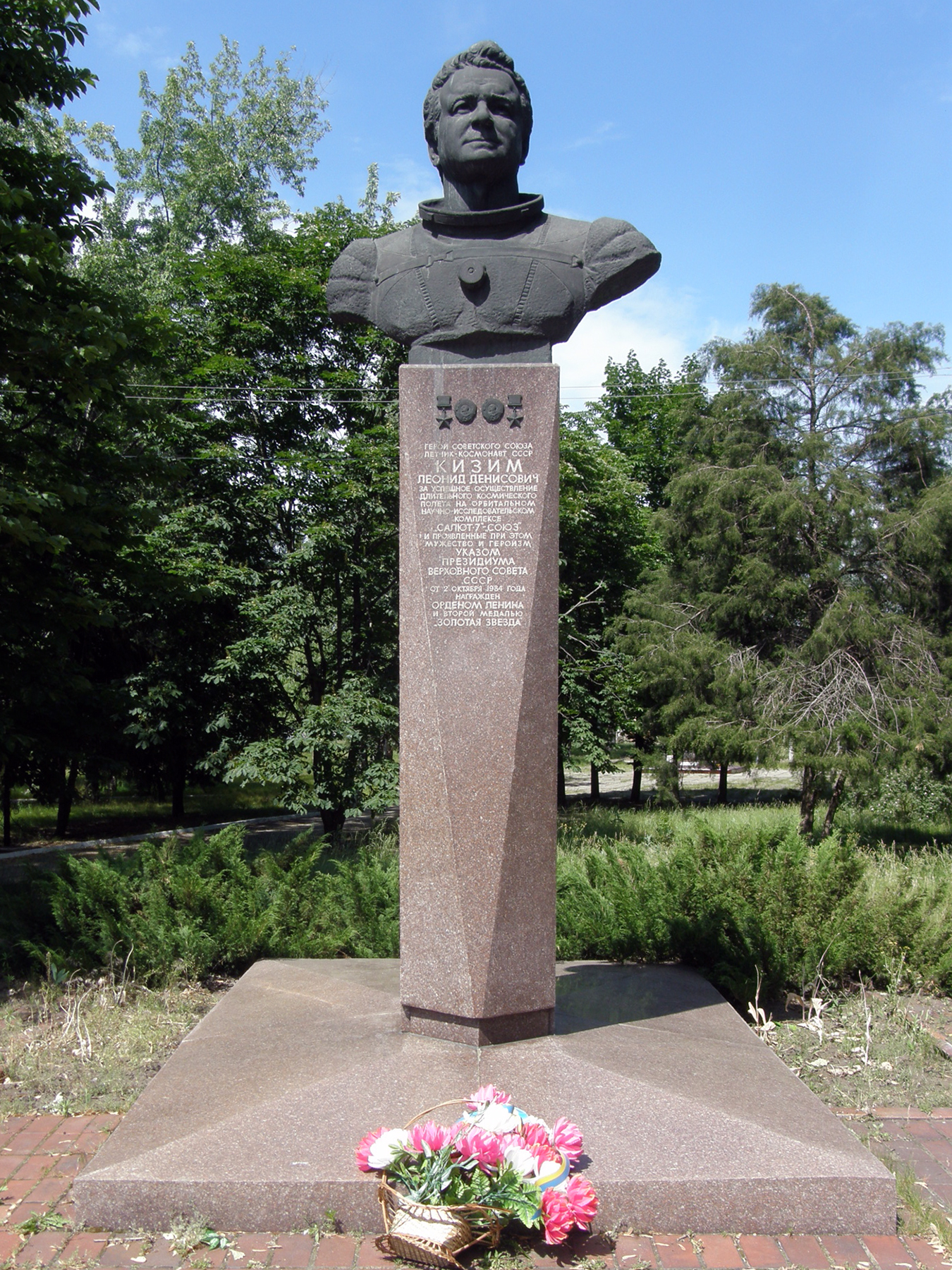 пам'ятник двічі Герою Радянського Союзу льотчику-космонавту Леоніду Денисовичу Кізіму, Лиман. Установлений у 1987, скульптор В. П. Полонік, архітектор А. Л. Лукін